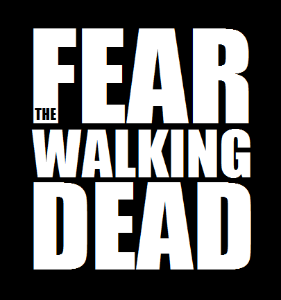 Logo de la série Fear the Walking Dead.